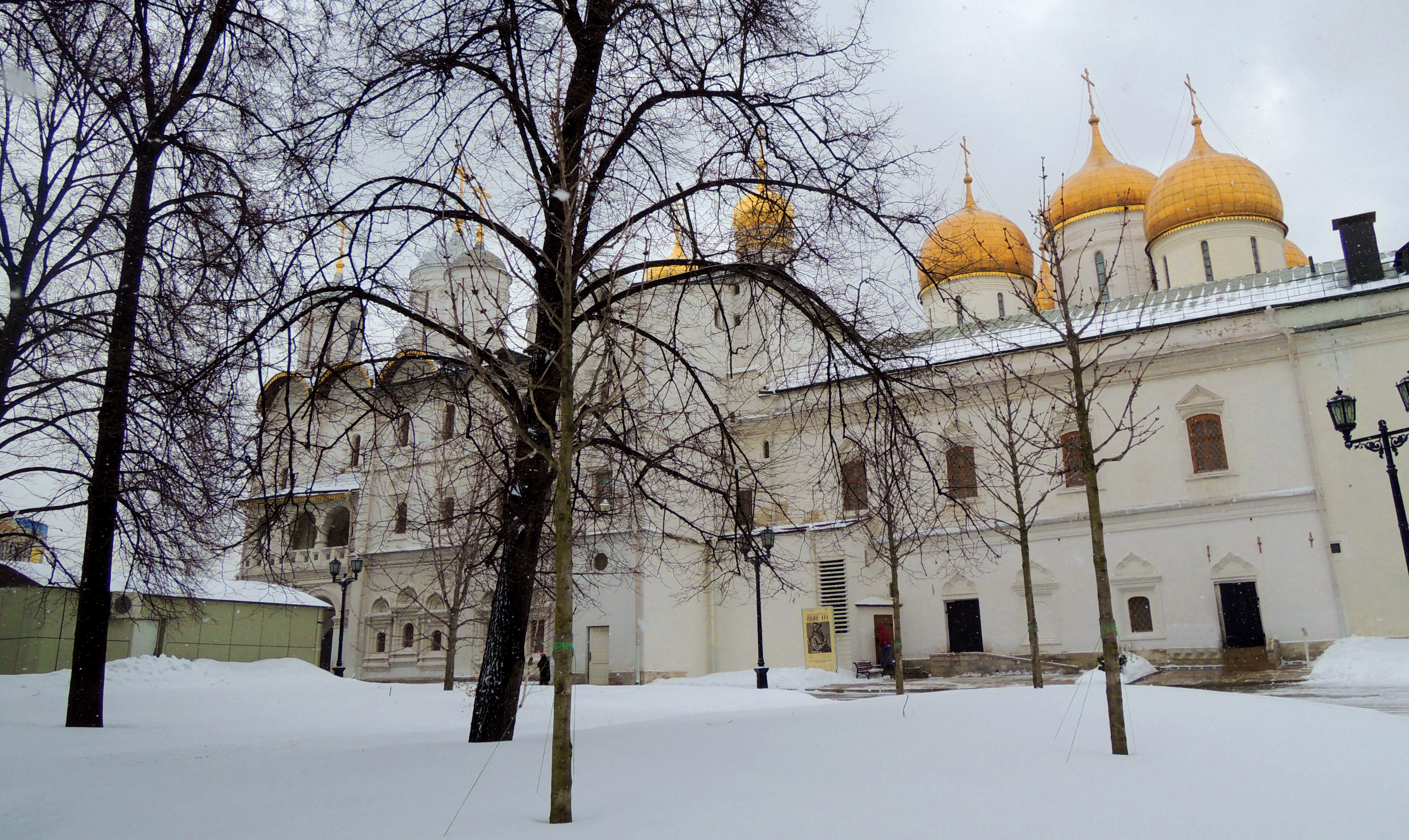 Патриарший дворец и церковь Двенадцати апостолов